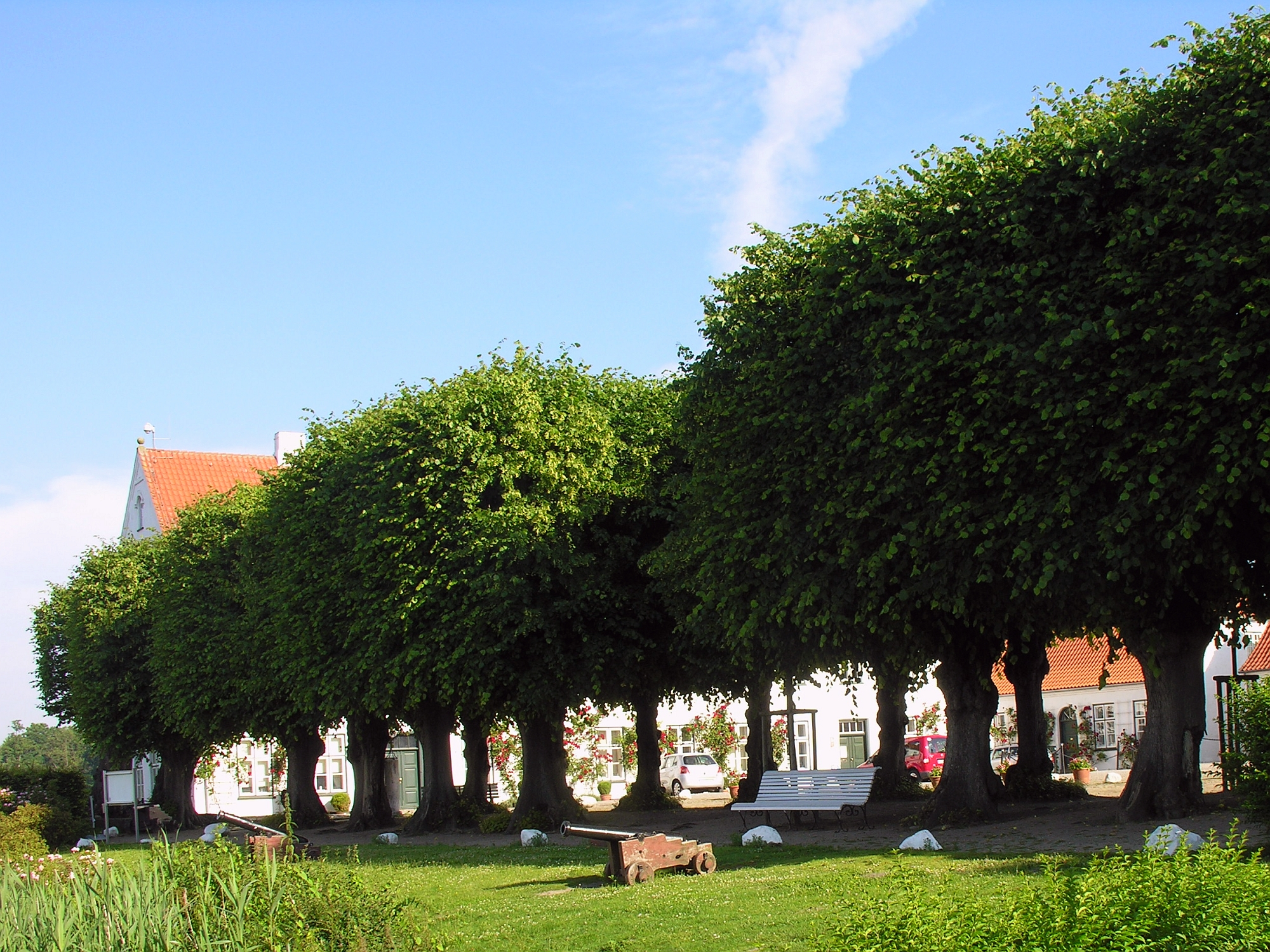 Kulturdenkmal 4.10 alte Lindenallee am Wirtschaftshof von Schloss Glücksburg Schleswig-Holstein Foto 2012 Wolfgang Pehlemann Steinberg/Ostsee DSCN0209